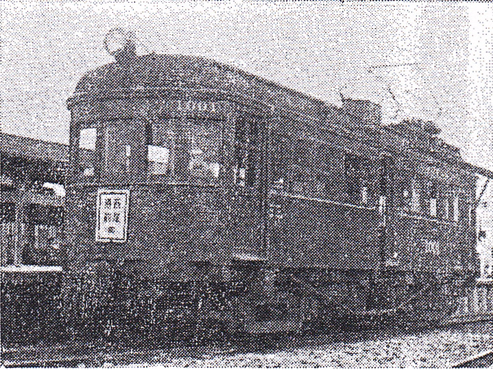 名鉄モ1000形電車。旧・愛知電気鉄道電3形として1922年新製。西尾線西尾駅にて撮影。